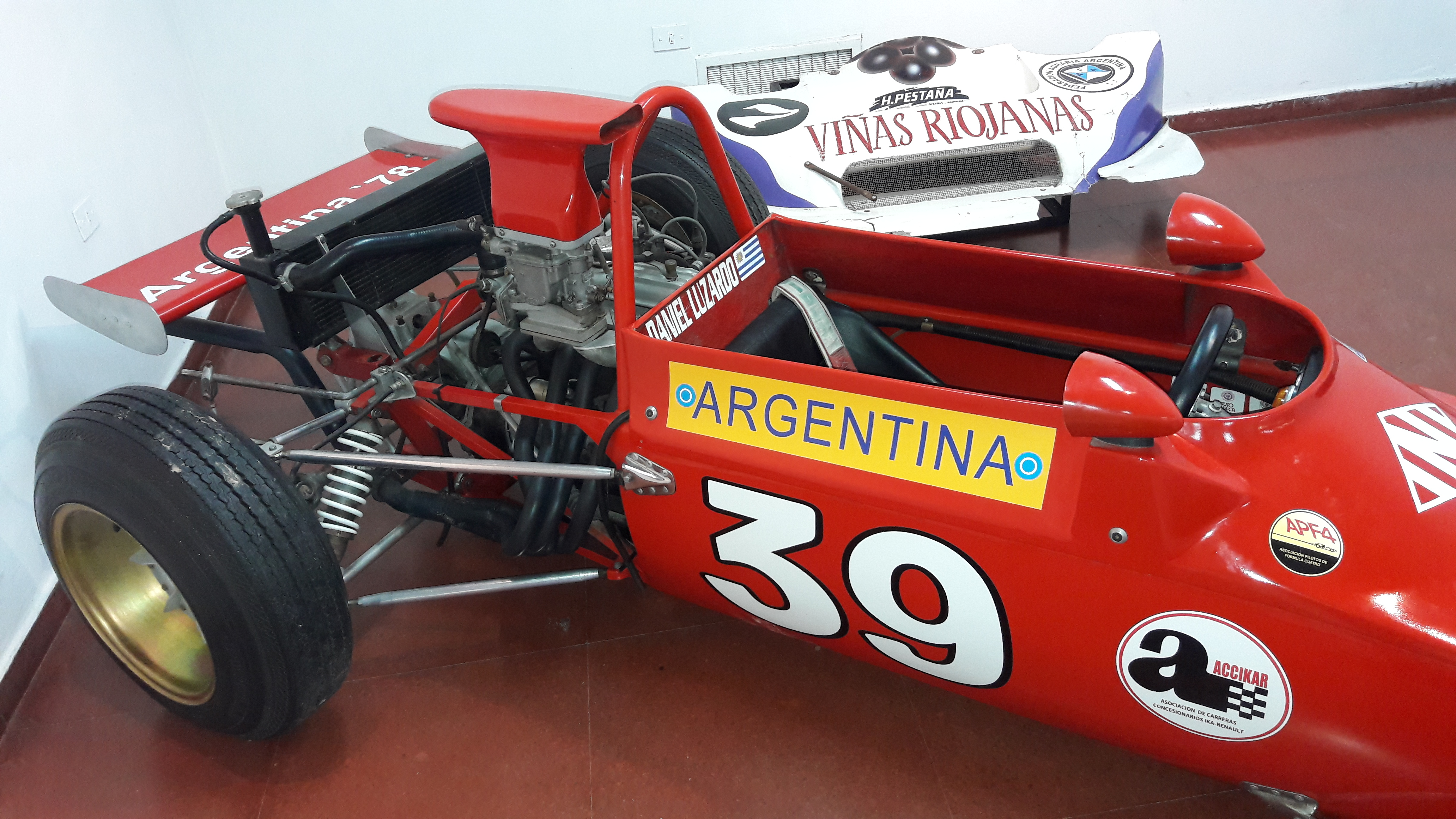 Crespi Renault - Daniel Luzardo. Expo Autos, Museo de Bellas Artes de Luján